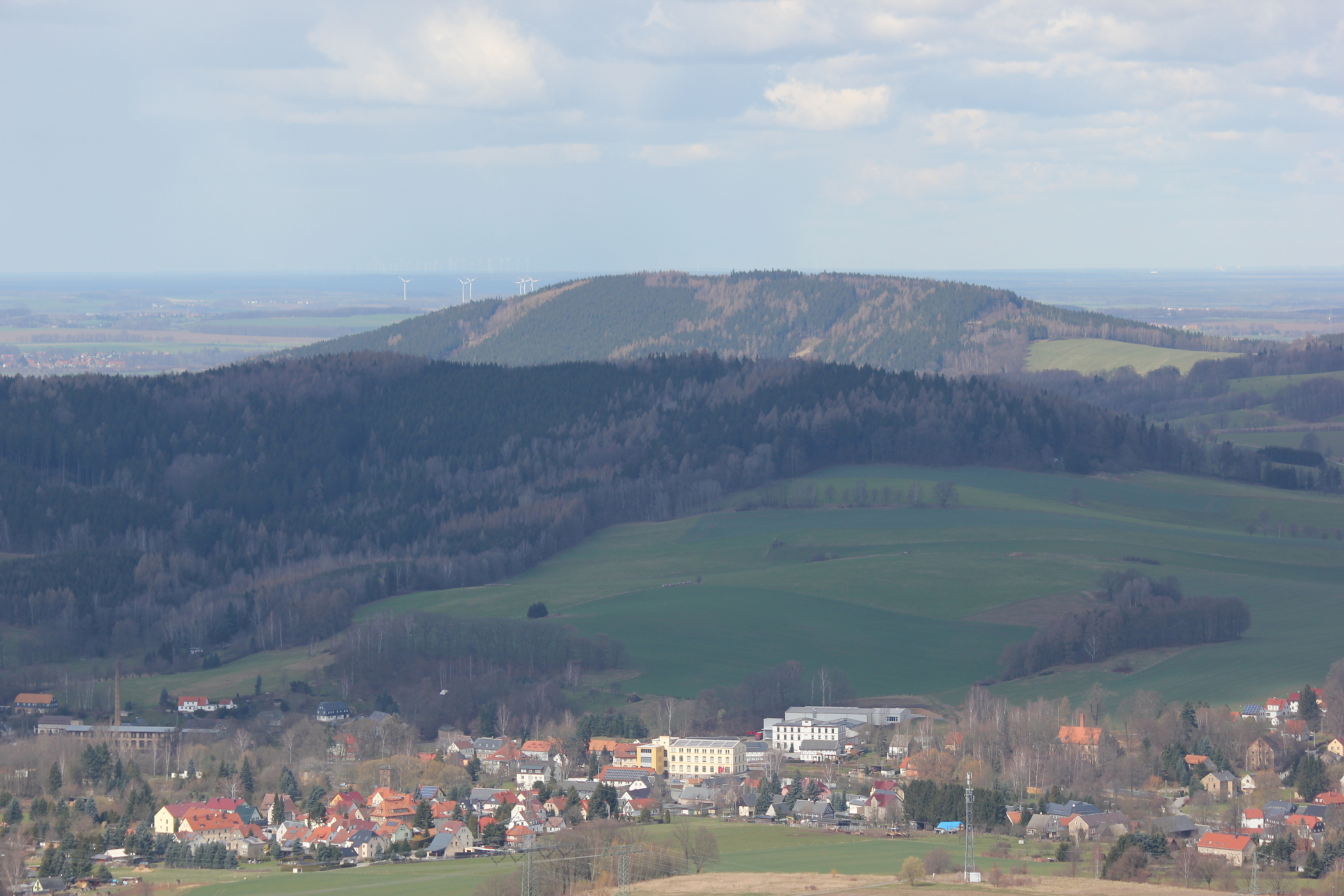 Hornjoserbsce: Wuhlad wot Běłoboha na Lubin.